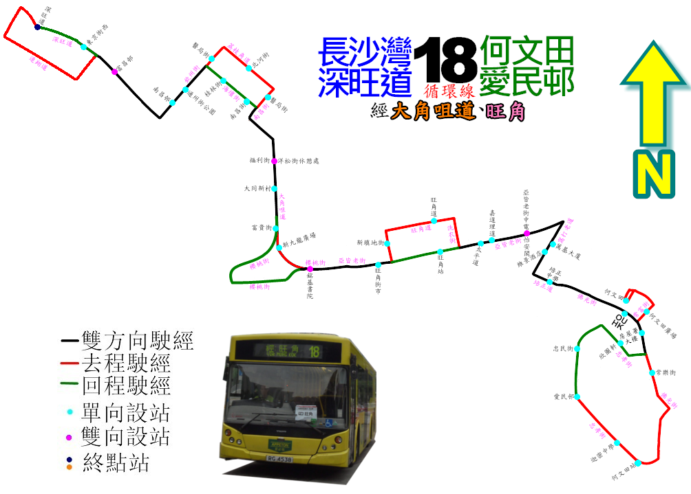 中文（香港）: 九巴18線的走線圖